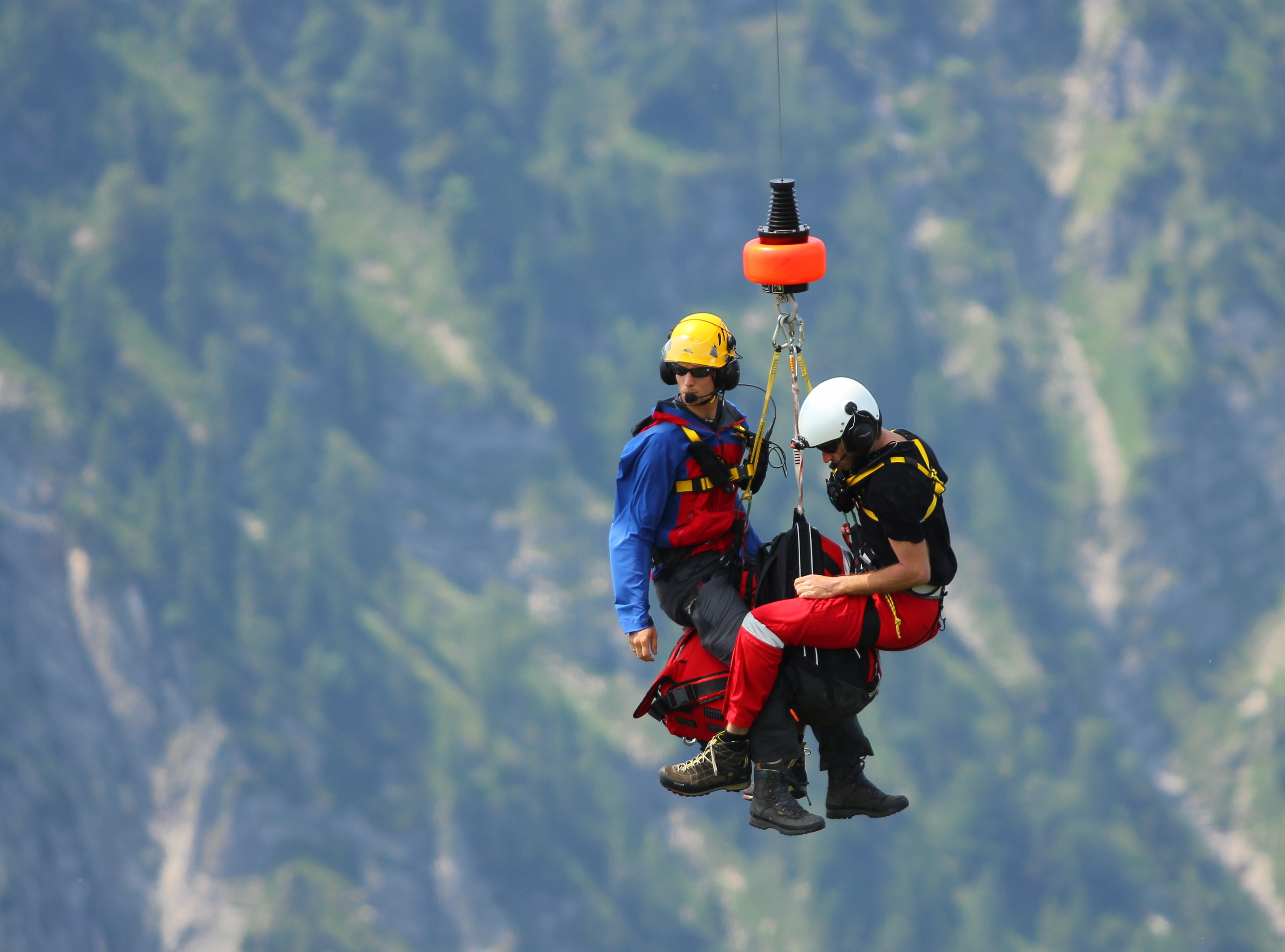 Bergrettung am Bodenschneid-Gipfel der 'Christoph 1', D-HMUM.